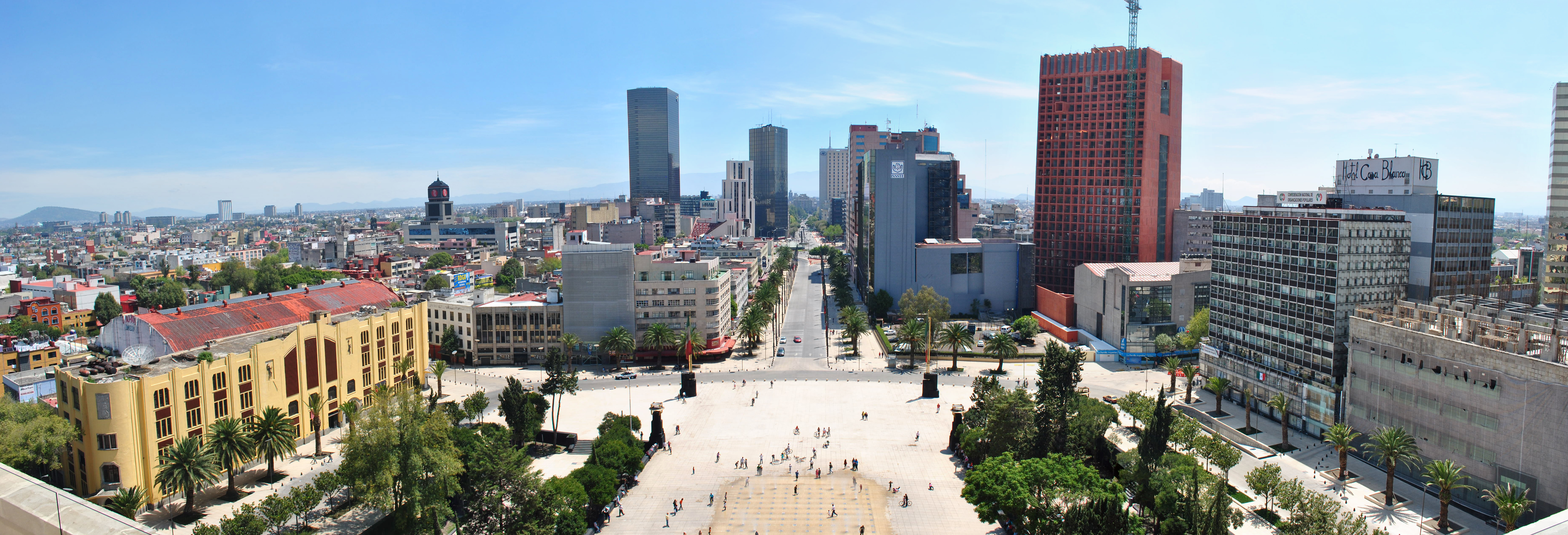 Panorámica desde el Monumento a la Revolución. Vista hacia el Oriente.